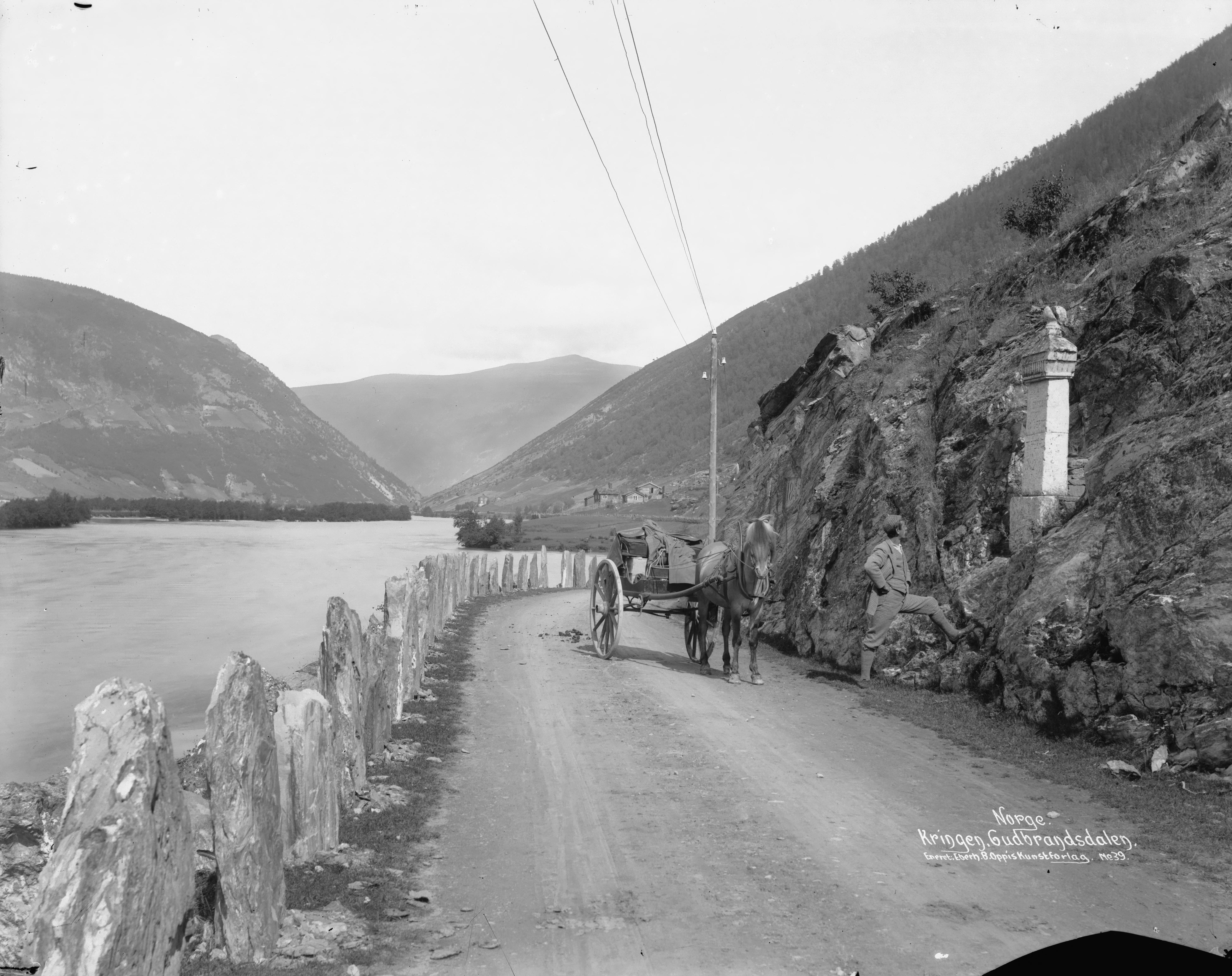 Påskrift negativ: Norge. Kringen. Gudbrandsdalen. Eneret: Eberh. B. Oppis Kunstforlag. No39 Påskrift konvolutt: B125 Sel Sinclairstøtten [Riksantikvaren] Sted: Kringen,Lågen Kommune: Sel Fylke: Oppland Tagger: landskap minnestøtte Sinclairstøtten hest og vogn mann